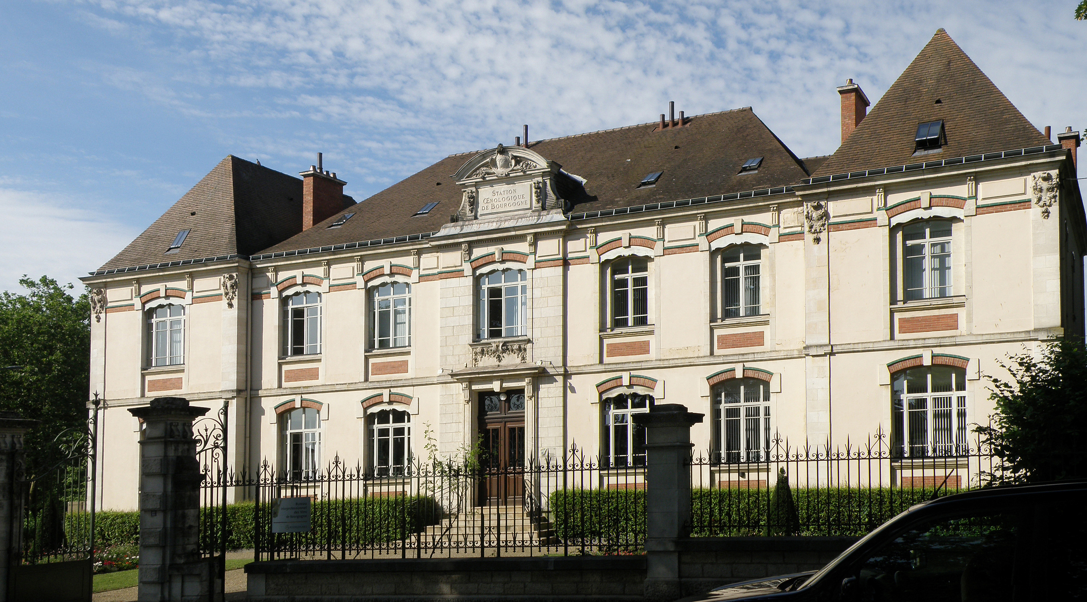 Beaune (Côte-d’Or, Bourgogne, France). Bureau interprofessionnel des vins de Bourgogne, boulevard Bretonnière.